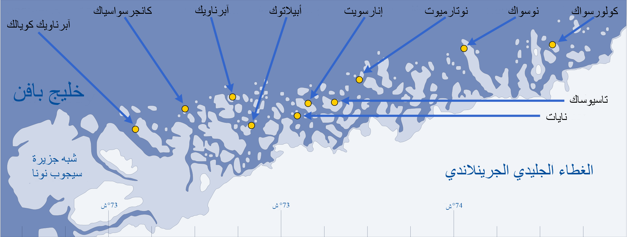 خريطة أخربيل آبرناويك بخليج بافن